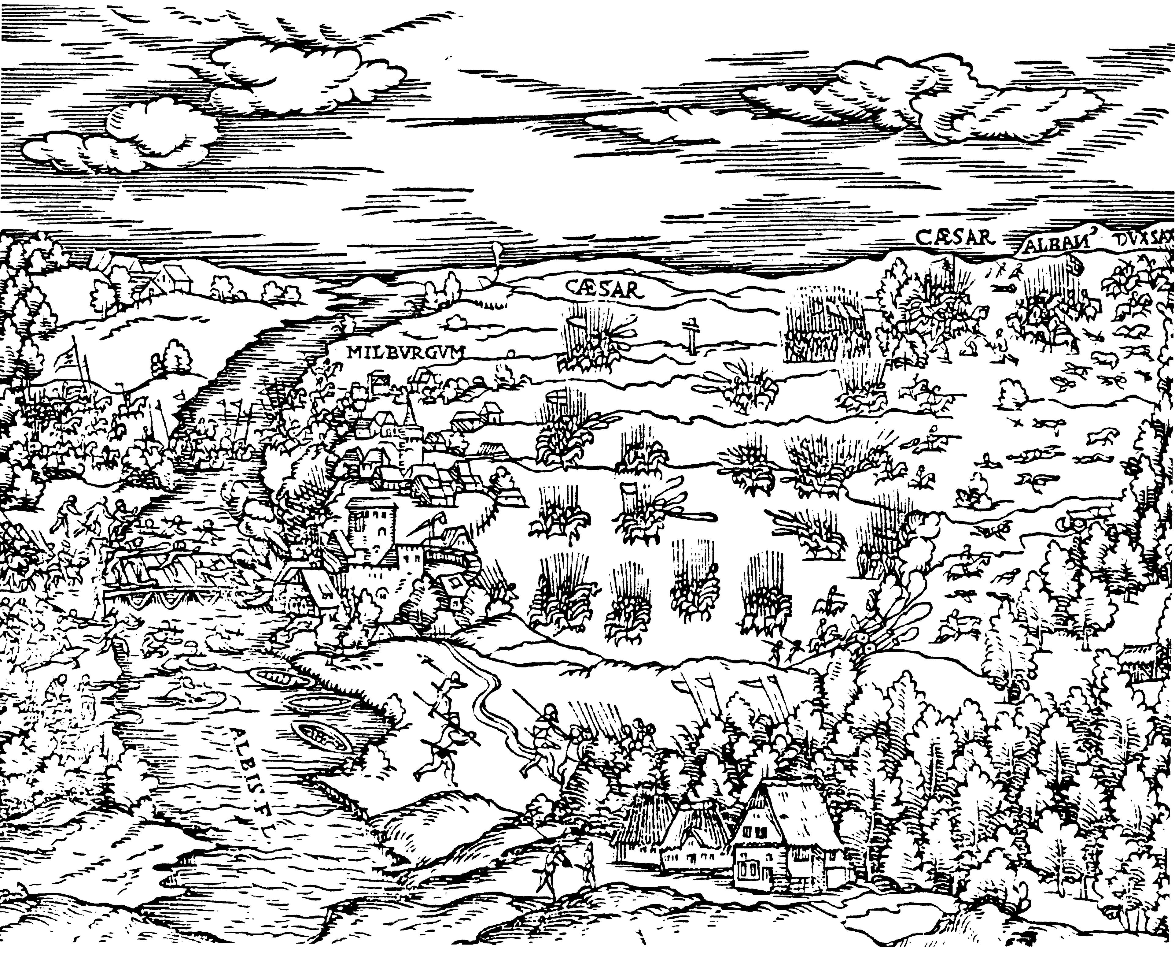 Schlacht bei Mühlberg 1547, Aus "Avila-Zuniga, Commentariorum de bello... Antwerpen 1550